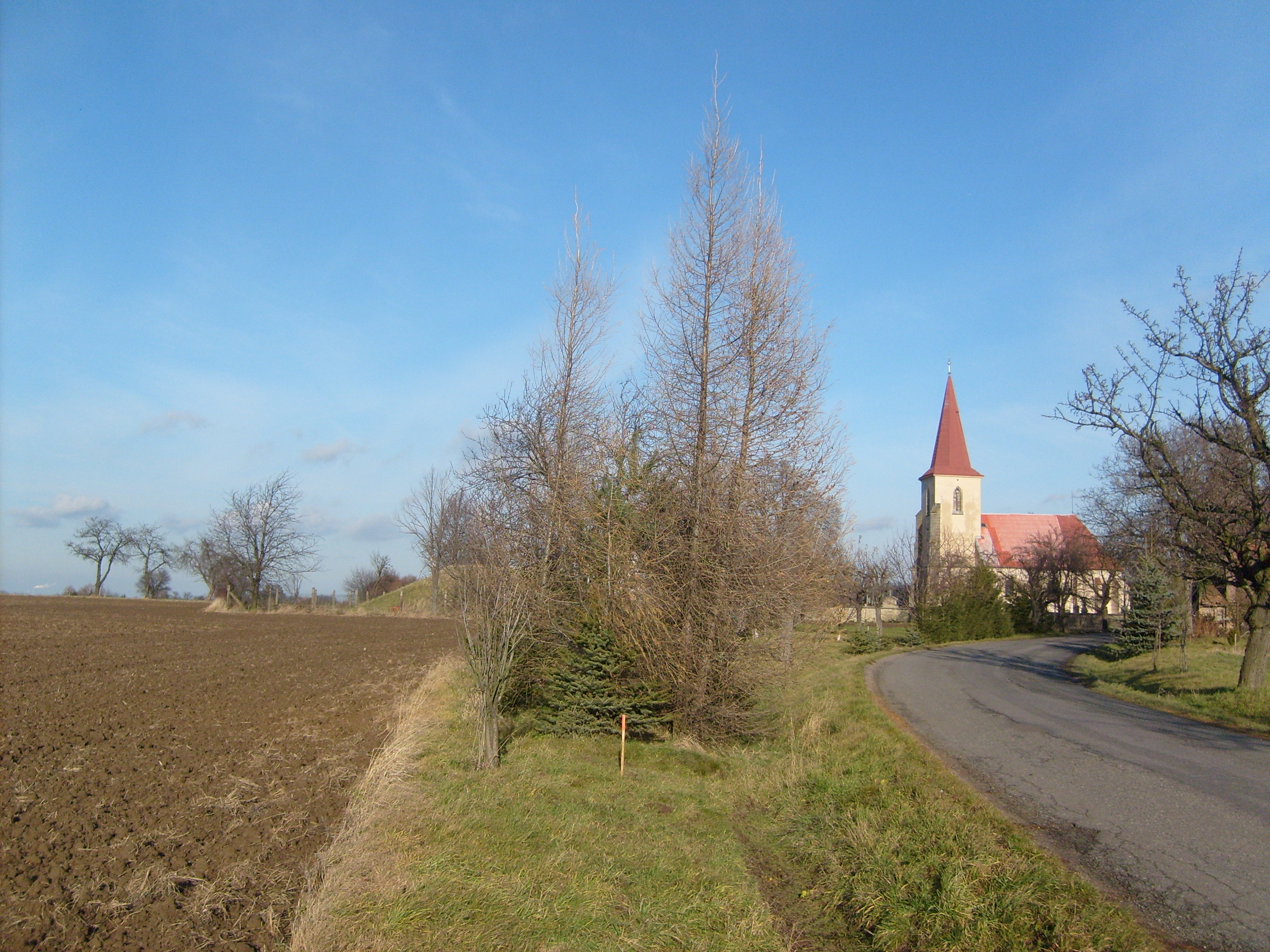 Kostel sv. Jiří, Tři Bubny, Orel, Pardubice Region, Czech Republic